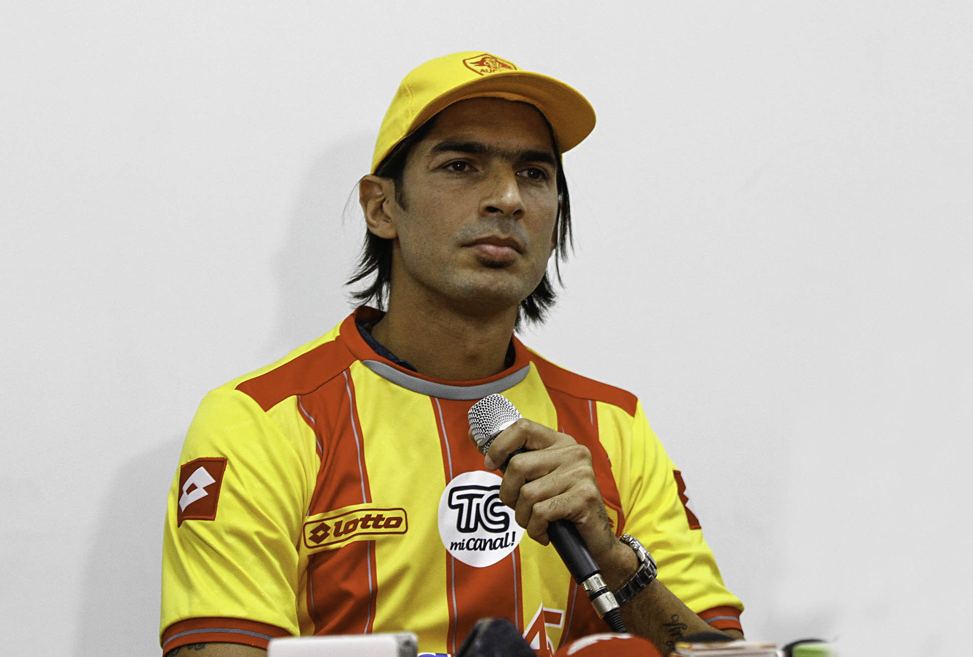 Quito, 17 mar (ANDES).- El delantero uruguayo Sebastián Abreu es la nueva contratación del Club Sociedad Deportiva Aucas. Foto: Micaela Ayala V./ANDES